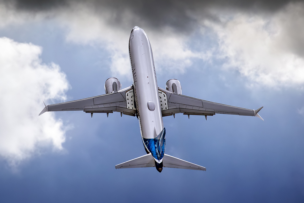 Boeing Company N8704Q Farnborough - (EGLF / FAB) Boeing 737-8 MAX cn 36988/5788